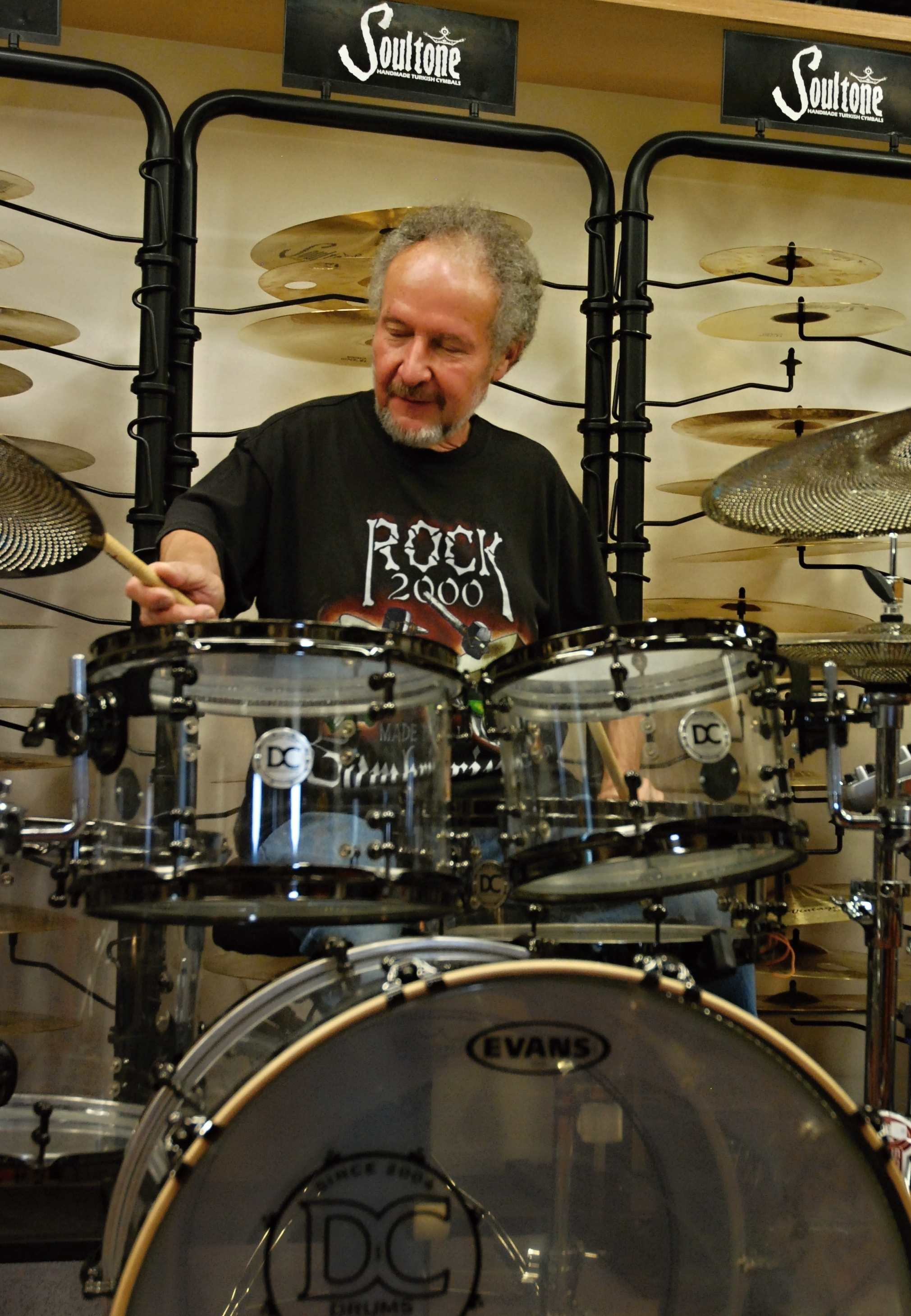 Karel Jenčík